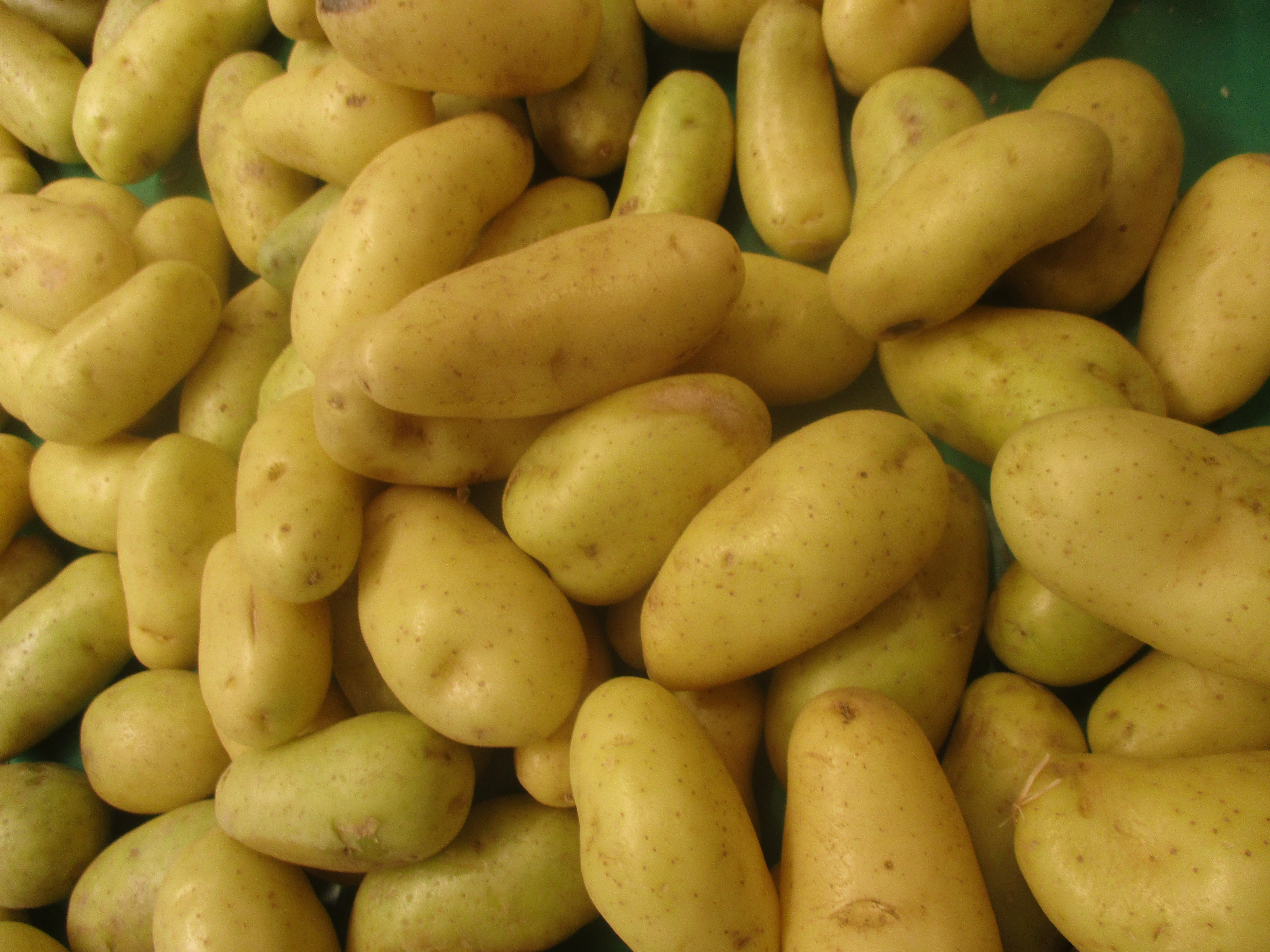 Pommes de terre Celtiane dans un étalage de la région parisienne.